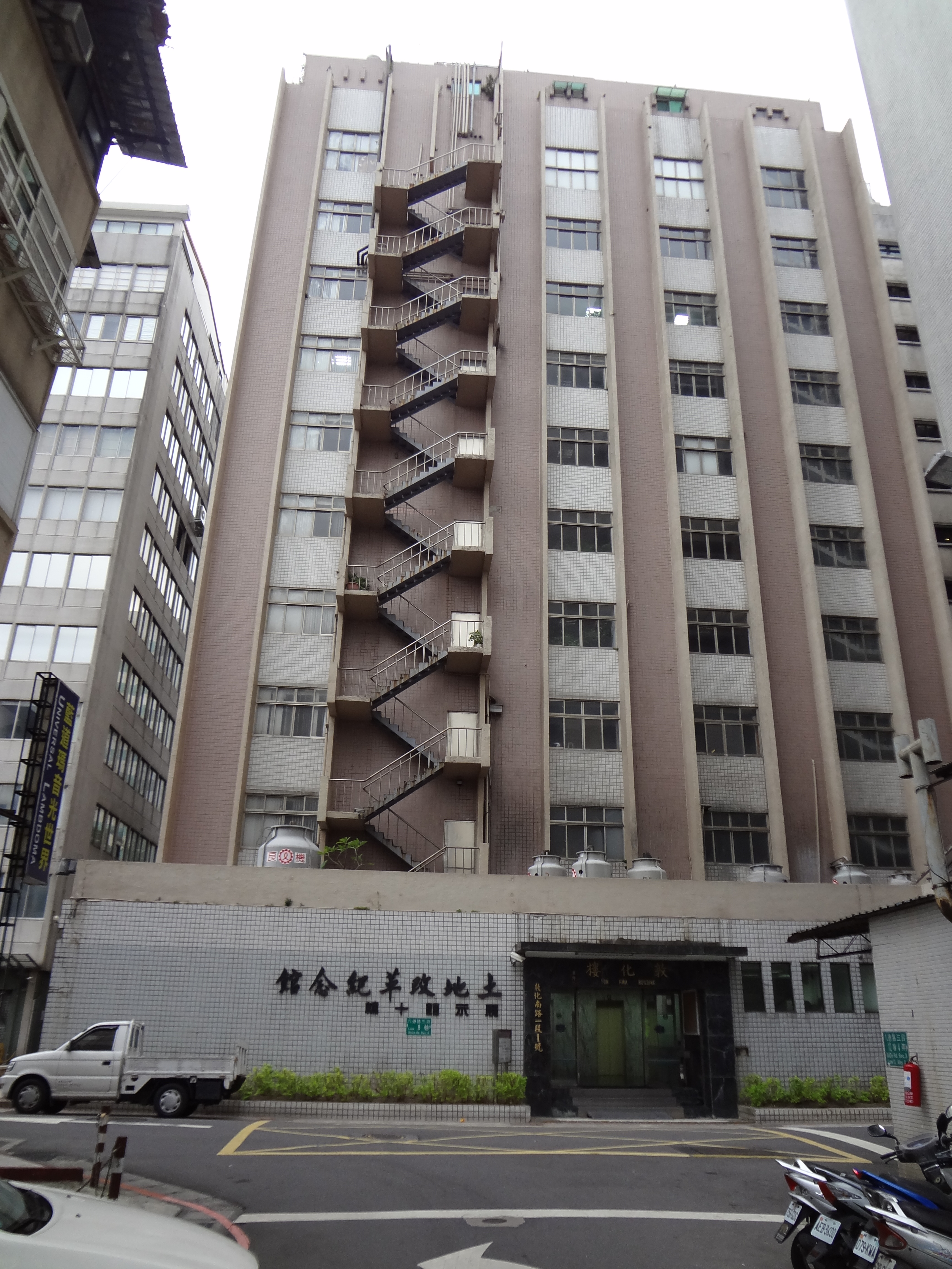 敦化樓八德路三段8巷側，中國地政研究所創辦人蕭錚題字。臺灣土地銀行松山分行位於1樓，土地改革紀念館位於10樓。